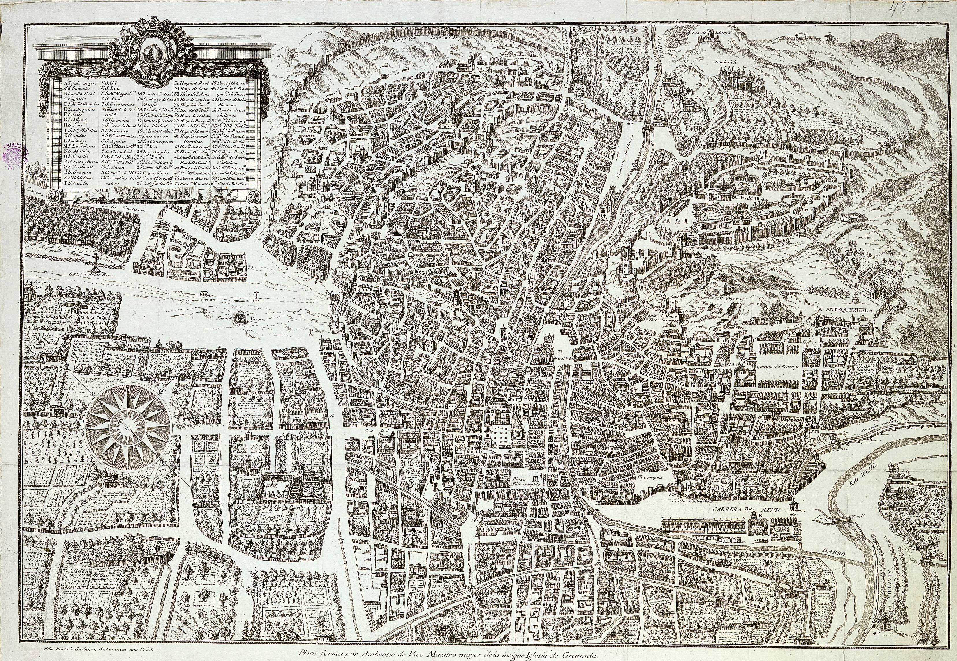 Pertenece a "Historia de la rebelión y castigo de los moriscos del Reino de Granada" de L. del Marmol Carvajal, 1797 Plano en perspectiva caballera. - Orientado con rosa con el N. al NO. del plano Es una copia del grabado por Francisco Heylan